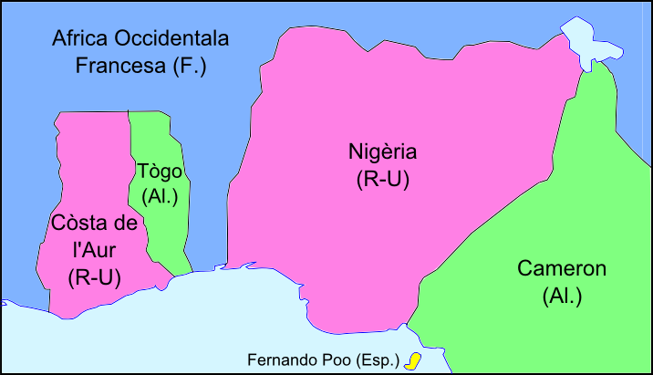 Colonizacion dau Golf de Guinèa en 1914.